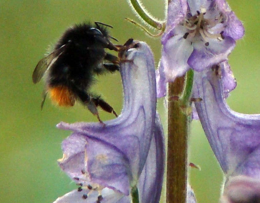 Bombus wurfleni in the Sognefjord area. Tyvhumle som "stel" nektar ved å bite hol på blomsten til tyrihjelmen,og syg det ut bakvegen